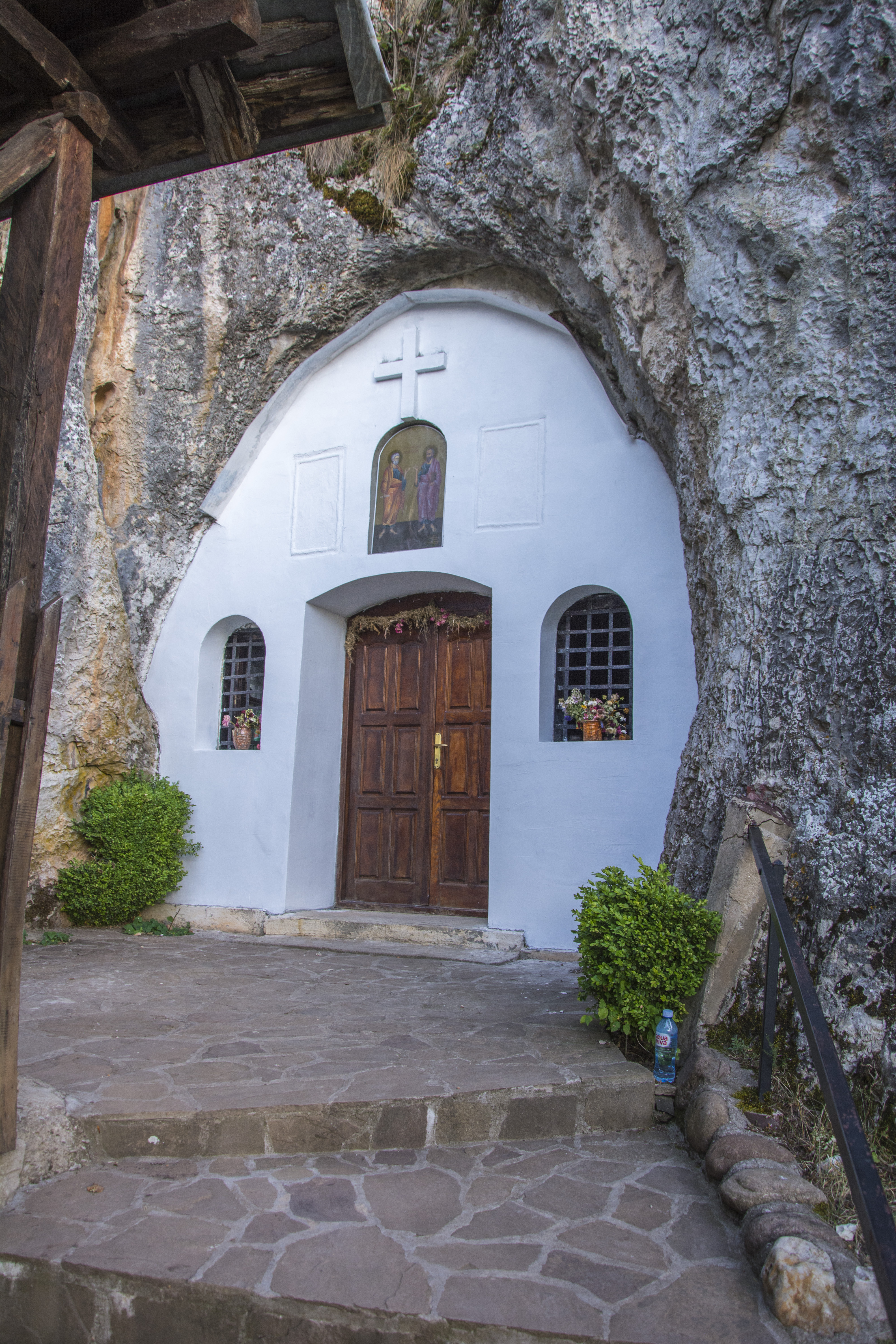 Црква Св. Петар и Павле, улаз